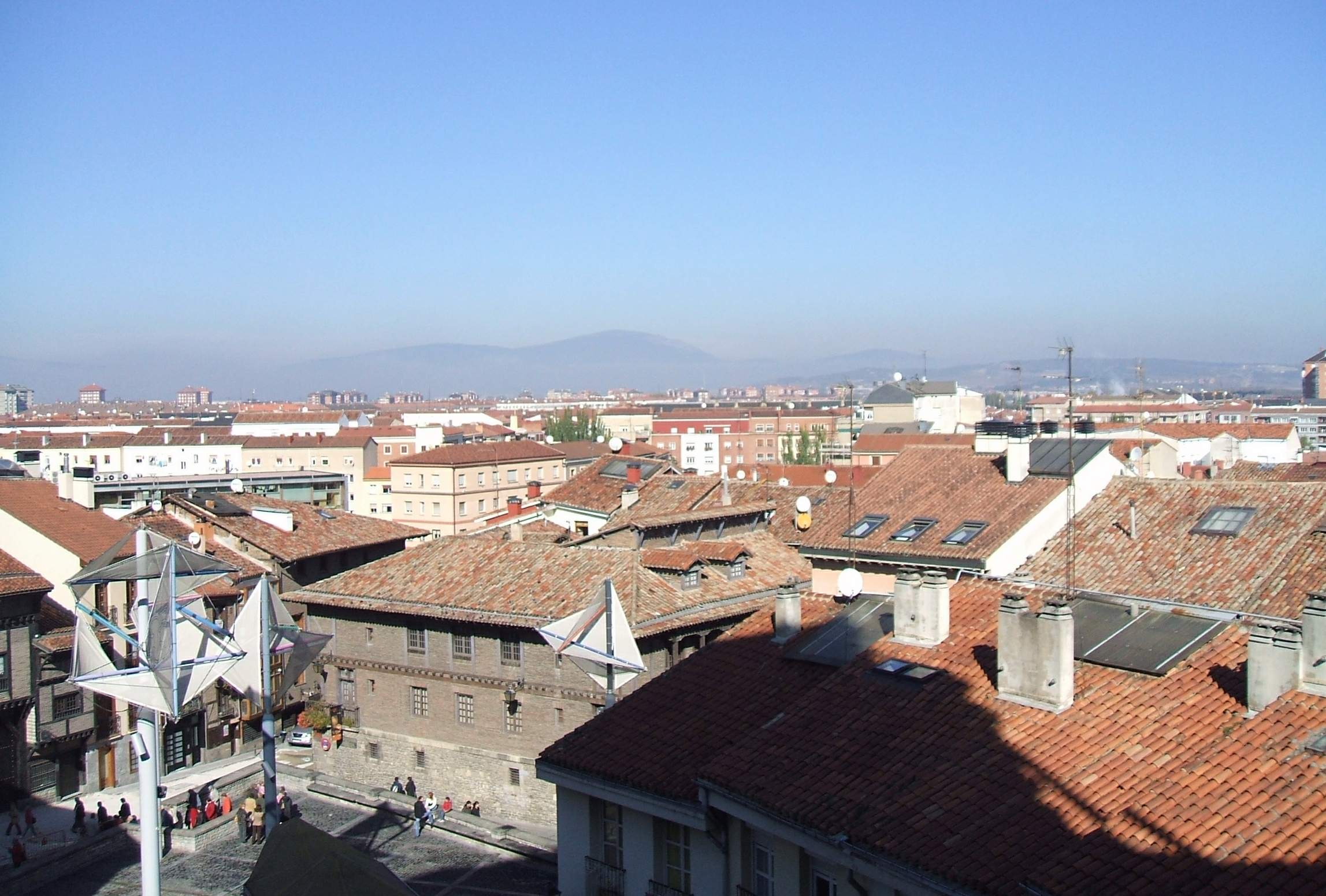 Vista desde el paso de ronda de la Catedral de Santa María (Catedral Vieja) de Vitoria-Gasteiz